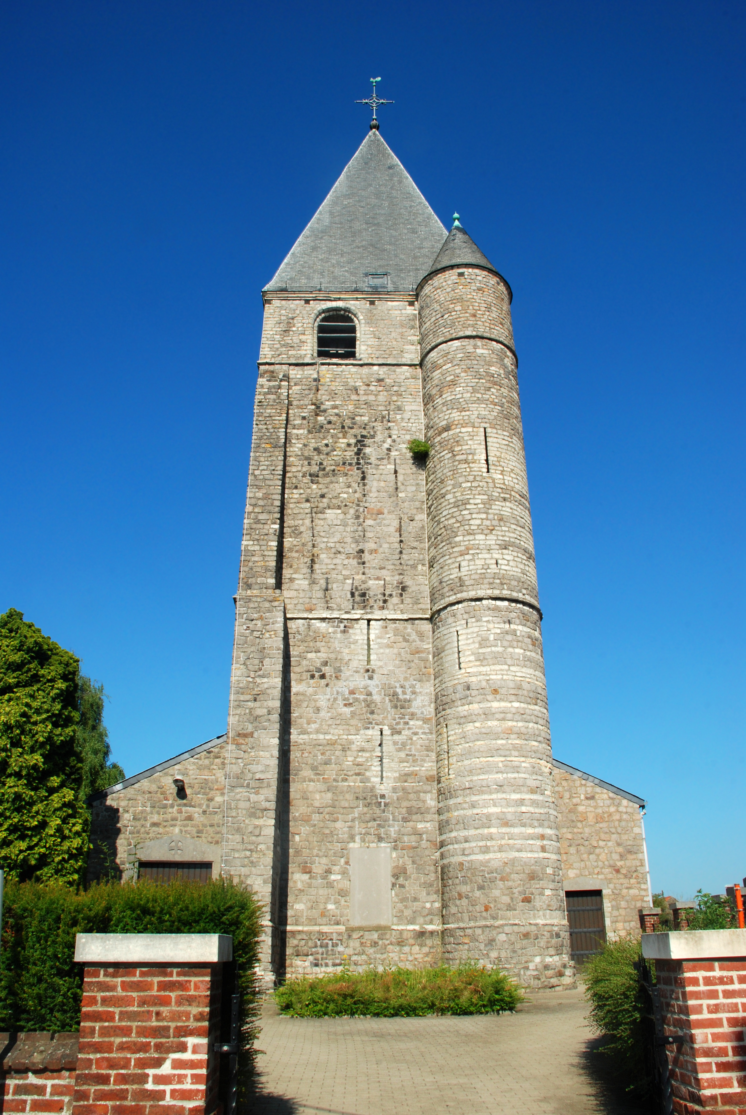 België - Vlaams Brabant - Tienen - Goetsenhoven - Sint-Laurentiuskerk